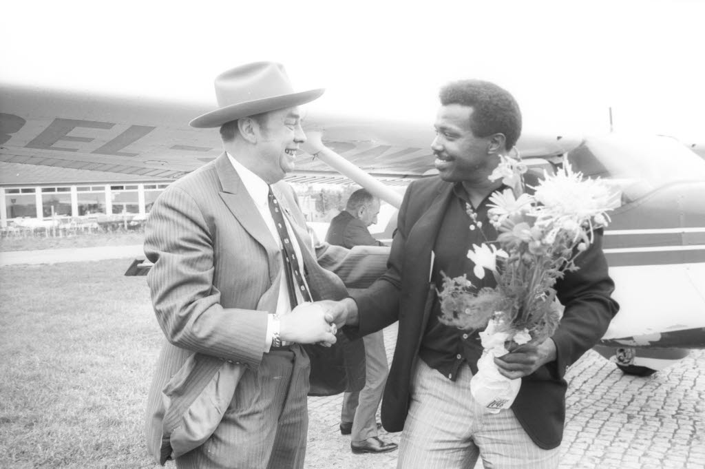 Der amerikanische Schwergewichtsboxer wird vor seinem Kampf gegen Peter Weiland vom Hamburger Boxpromoter Theo Wittenbrink (links) begrüßt.